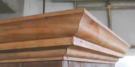 restauro di una cornice